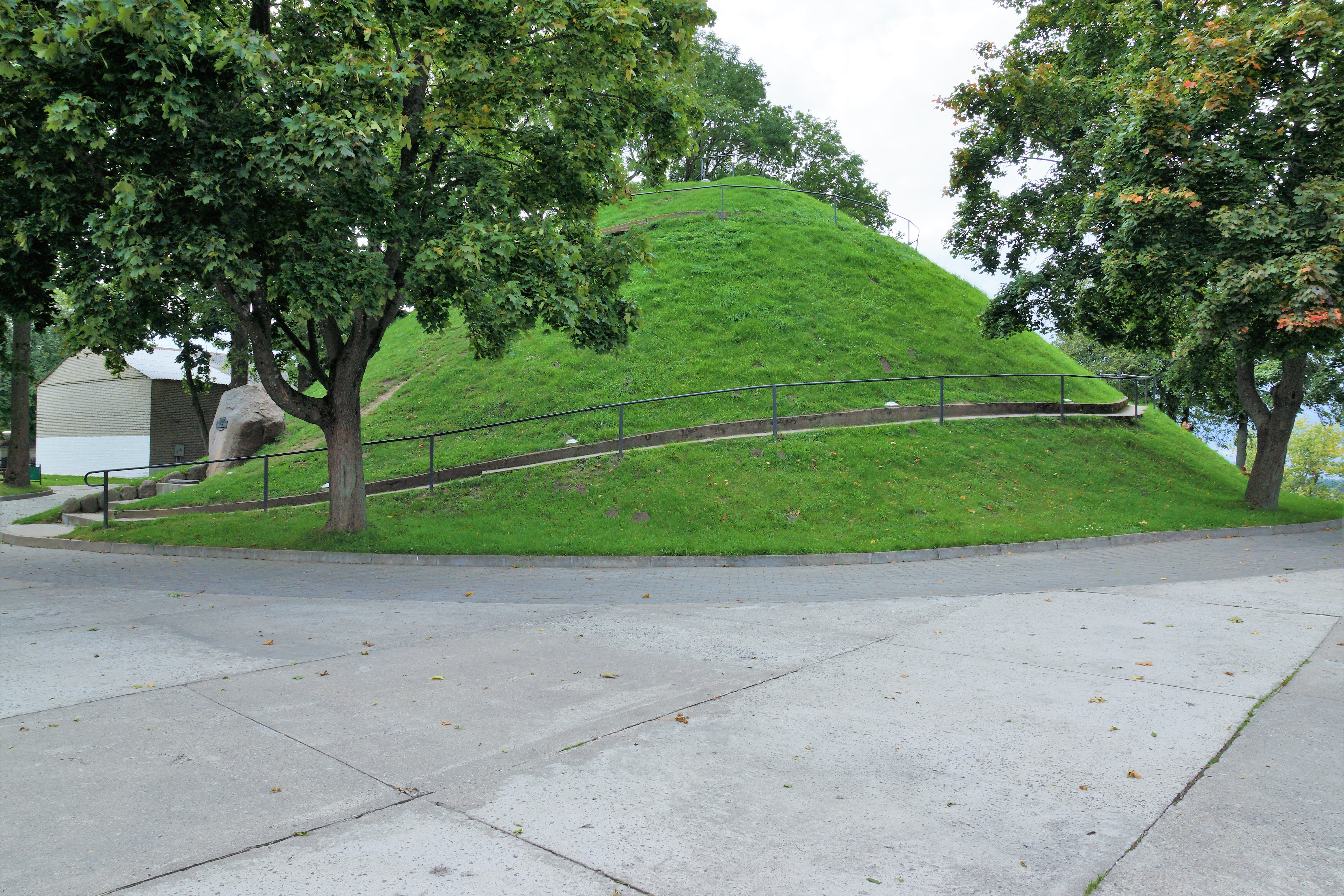 Беларуская (тарашкевіца): Курган Бессьмяротнасьці Адама Міцкевіча. г. Наваградак This is a photo of Belarusian heritage monument. Reference number: 411Д000405 ( WLM)